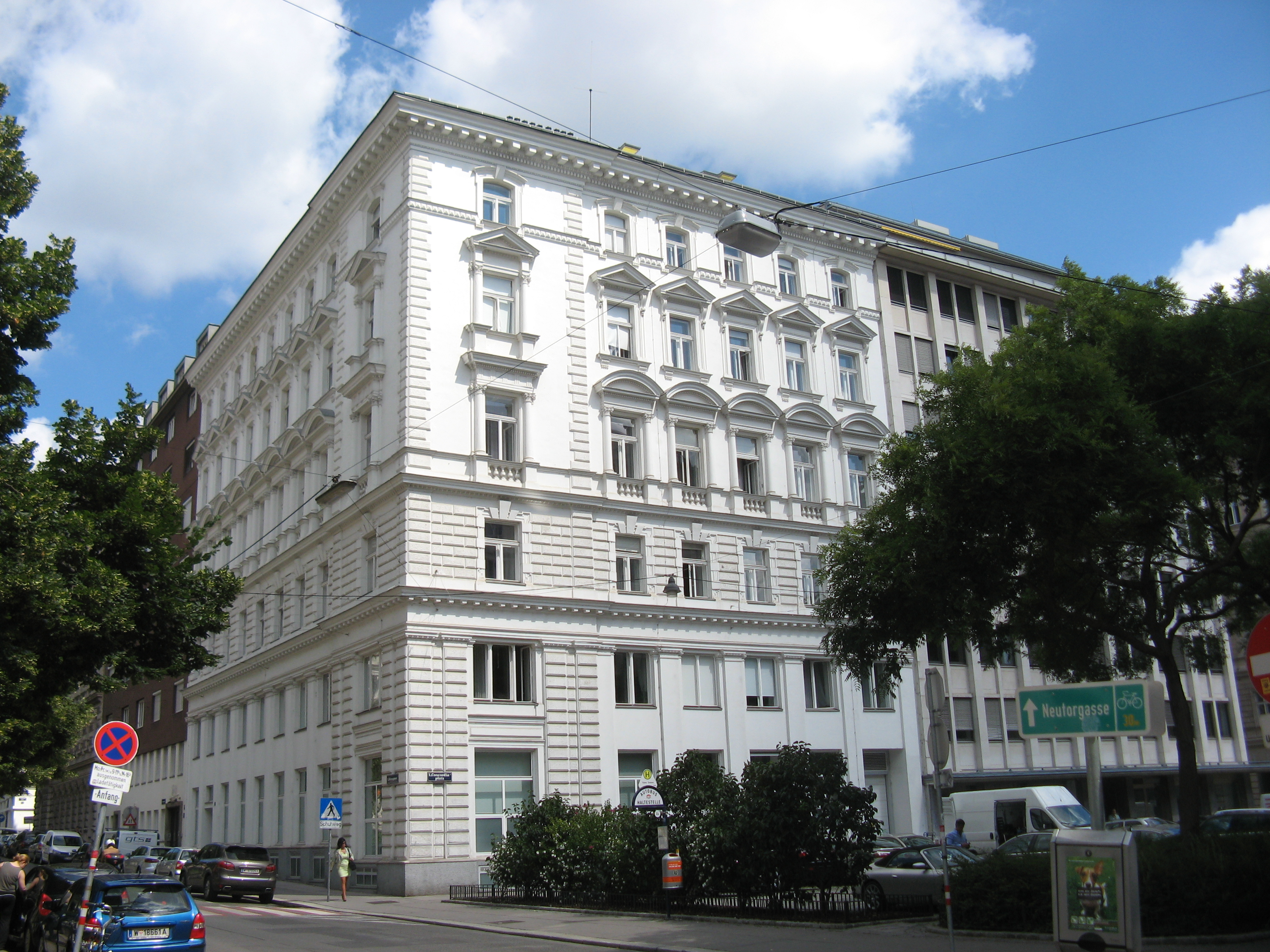 Haus (1880-81) von Wilhelm Stiassny, Concordiaplatz 1, Wien-Innere Stadt